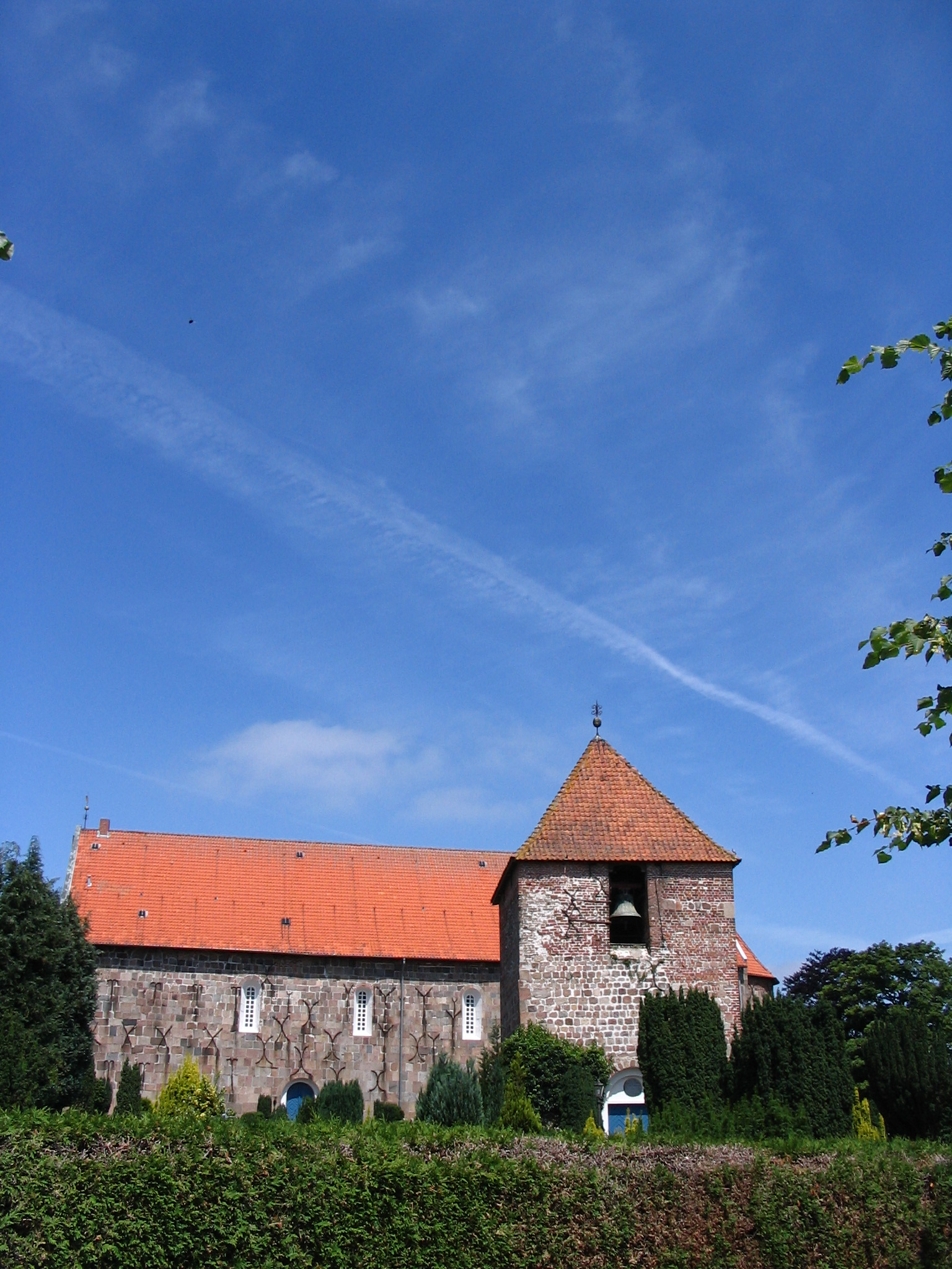 Foto:Aukje Soepboer // EFG-Archiv Jever // mit ausdrücklicher Erlaubnis der Fotografin: public domain